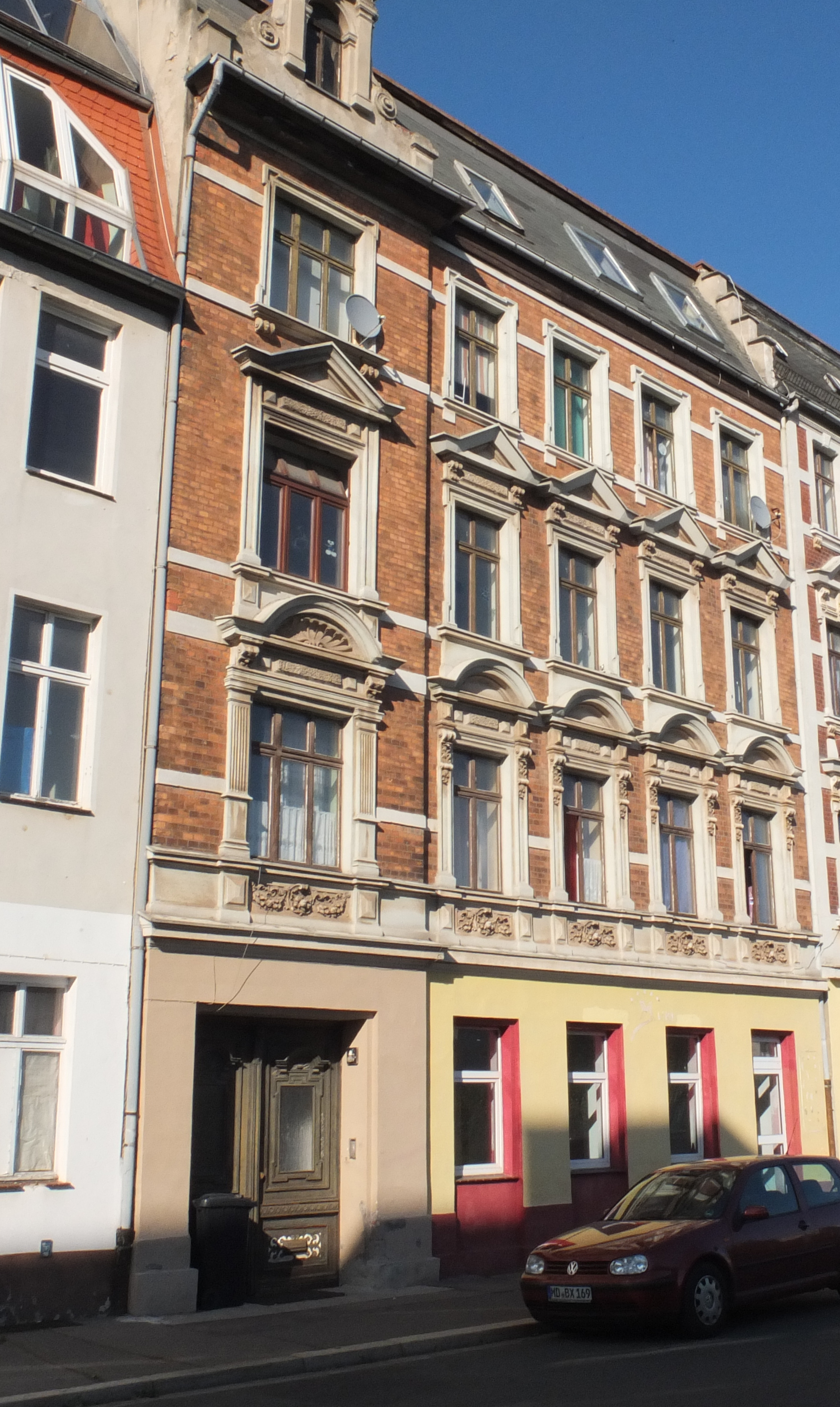 Wohnhaus in der Ritterstraße 7, Magdeburg Neue Neustadt